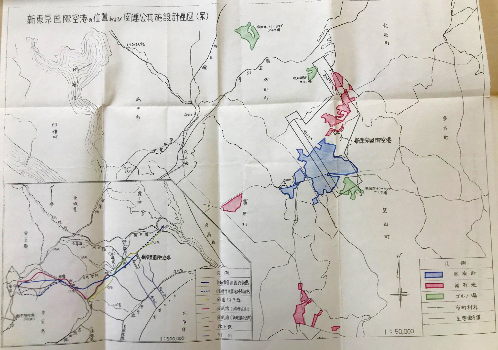 1966年7月4日の日本国政府閣議資料。 国立公文書館にて撮影。